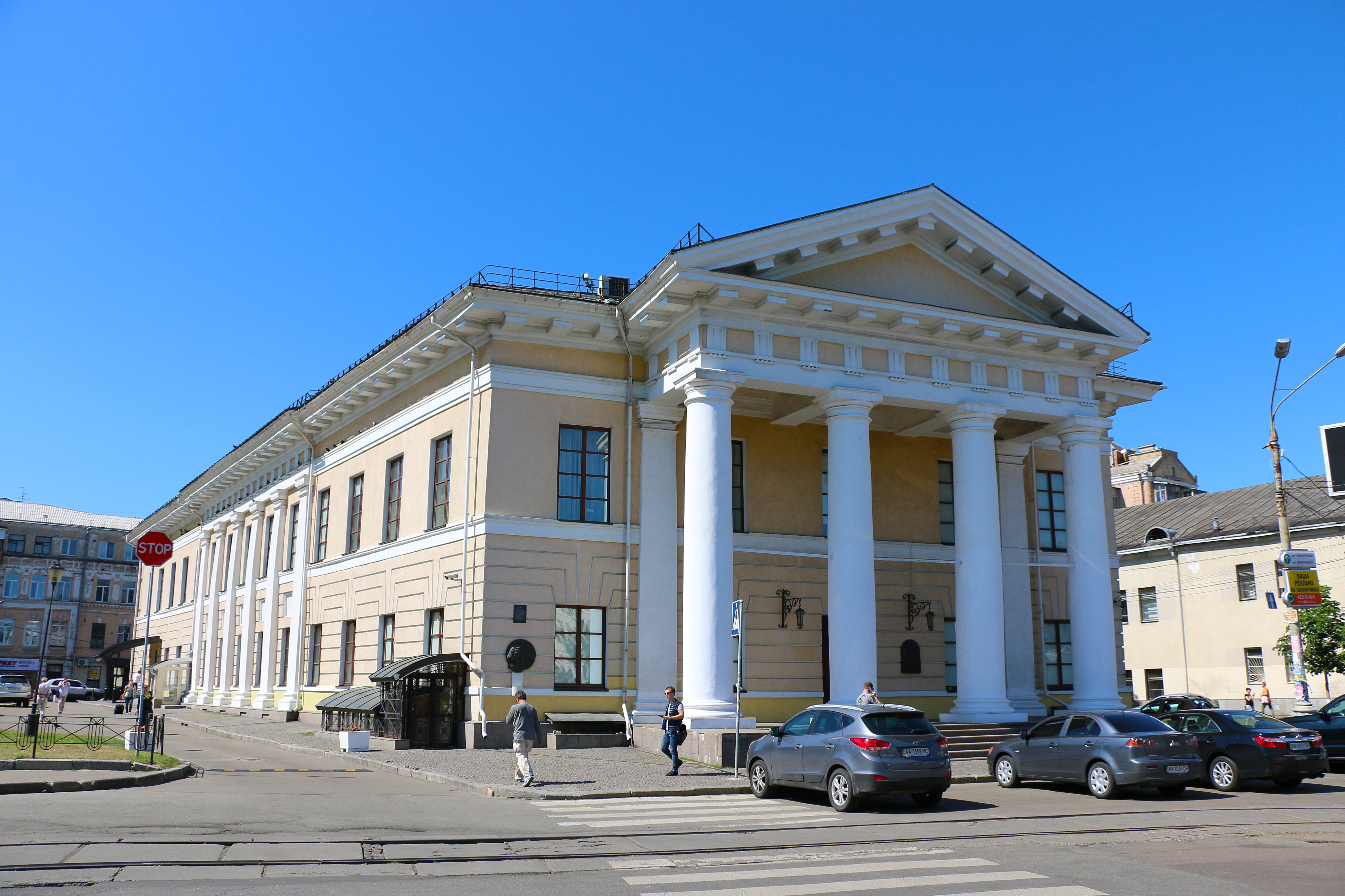 Будинок контрактовий, де у 1821–1825 рр. збиралися декабристи; який відвідували відомі діячі культури: у 1821 р. — О. Пушкін, у 1835 р. — М. Гоголь, Т. Шевченко, у 1847–1850 рр. (з перервами) — О.де Бальзак; у 1847 р. — Ф. Ліст, Київ, Межигірська вул., 1/1